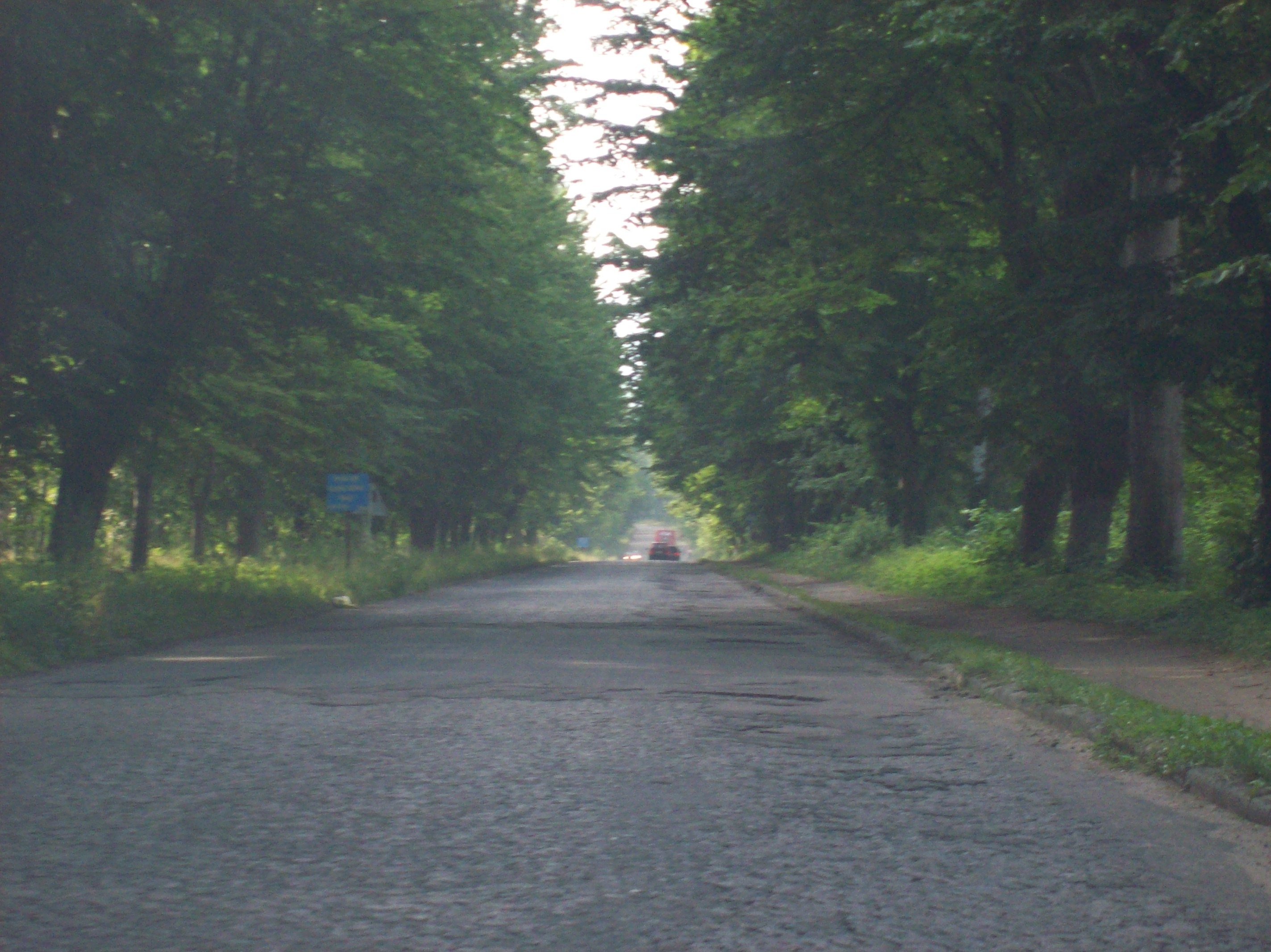 DW 215 in Rozewie (Poland)